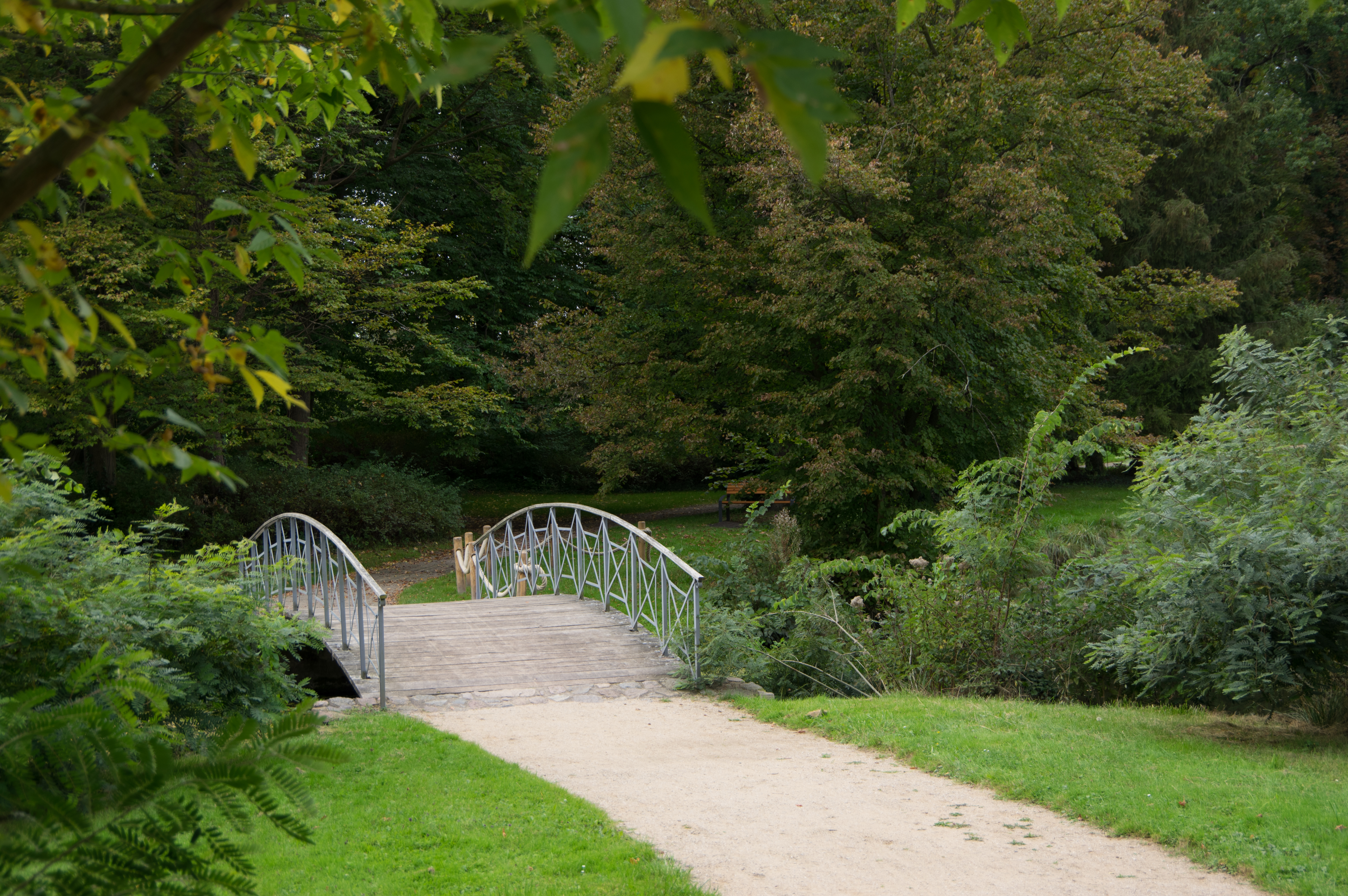 Schwedt/Oder, Ortsteil Criewen in Brandenburg. Der Park ist Teil der Gutsanlage Criewen und wurde ab 1822 nach Plänen von Peter Joseph Lenné errichtet. Teile des Barockgarten wurden mit einbezogen.